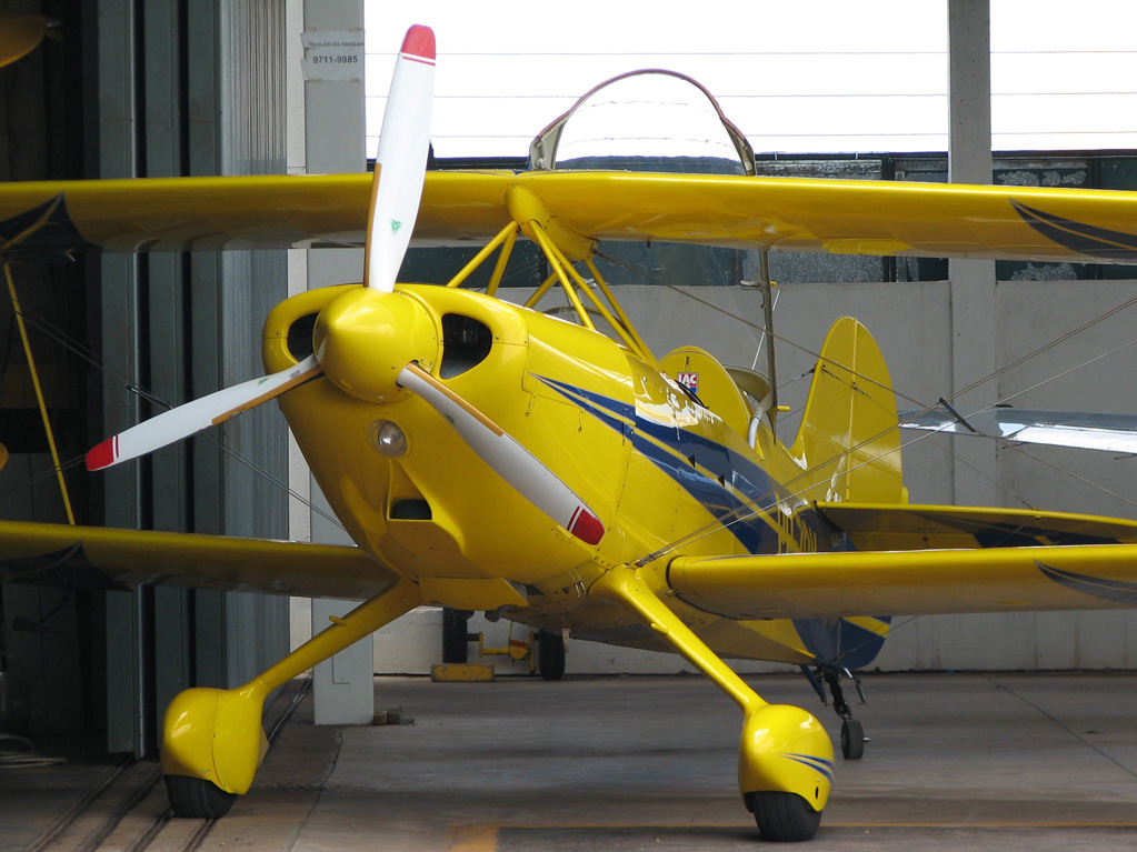 Steen Skybolt